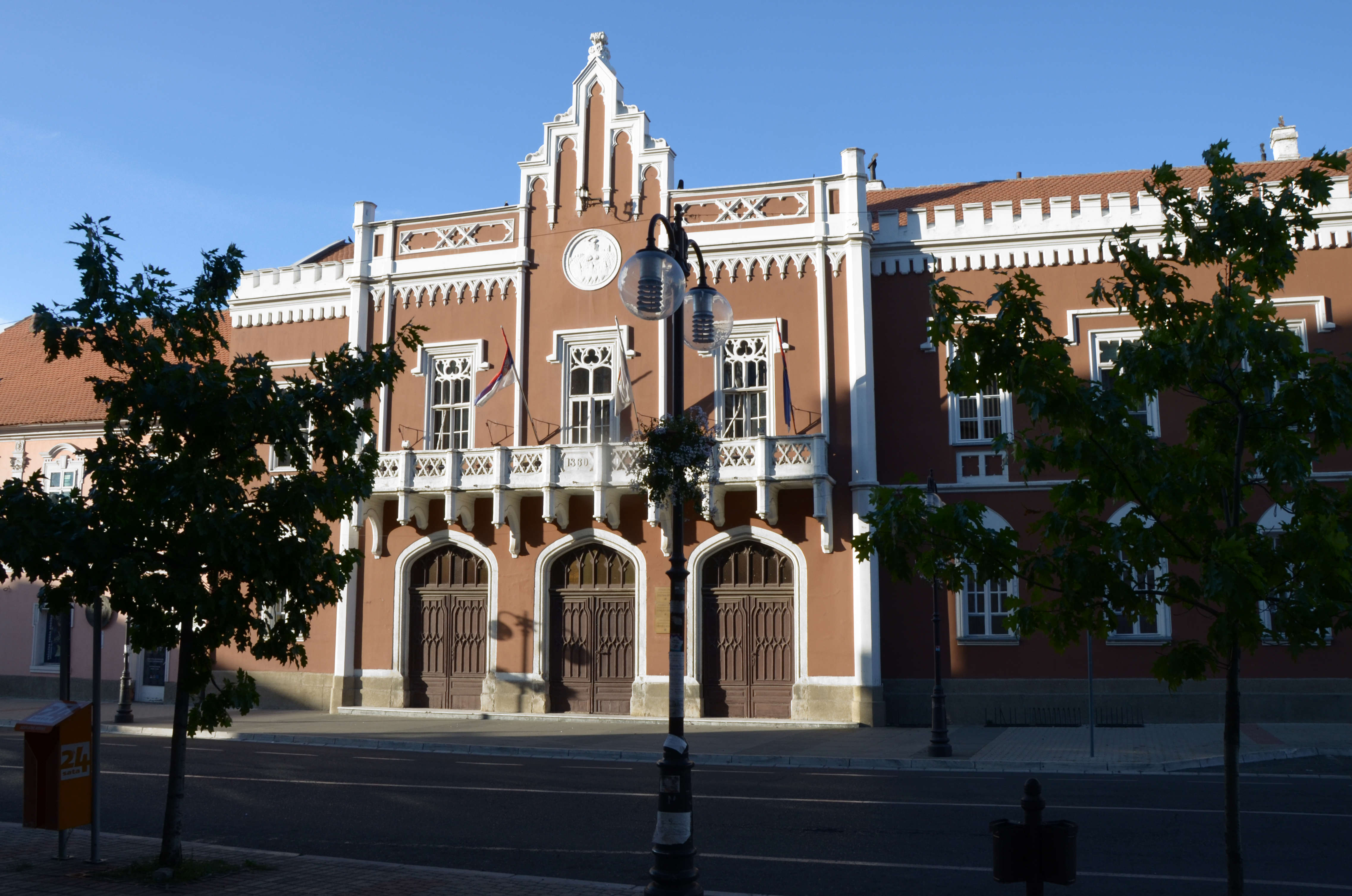 Gradska kuća u Vršcu na Trgu pobede broj 1